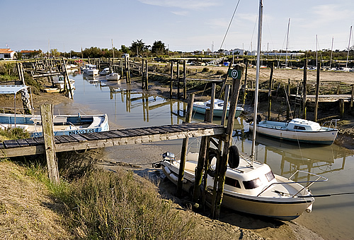 Le petit port du Goizil - La Couarde - Île de Ré - Charente-Maritime - France Photo issue de ma banque d'images personnelle